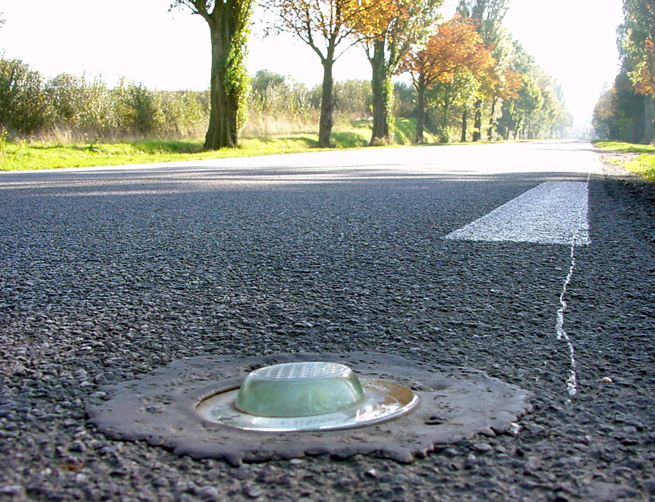 Photo prise en 2005 dans le département du nord, en France, sur la route Cassel-Dunkerque. voir la page Wikipédia en français consacrée à la pollution lumineuse ou dispositif rétro-réfléchissant pour en savoir plus. Photo : F. Lamiot, mise à disposition sous licence